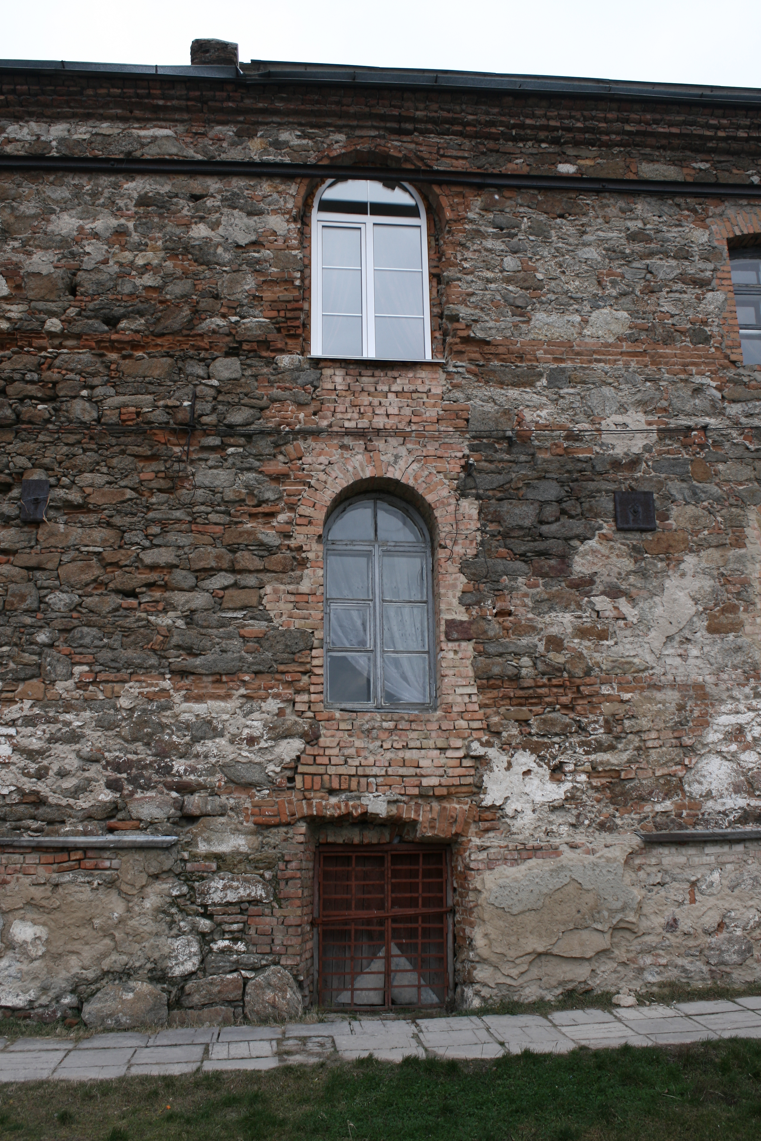 Бердичів, Соборна пл., 25, Монастир Босих Кармелітів, фрагмент стіни однієї з внутріщніх споруд монастиря (музею)